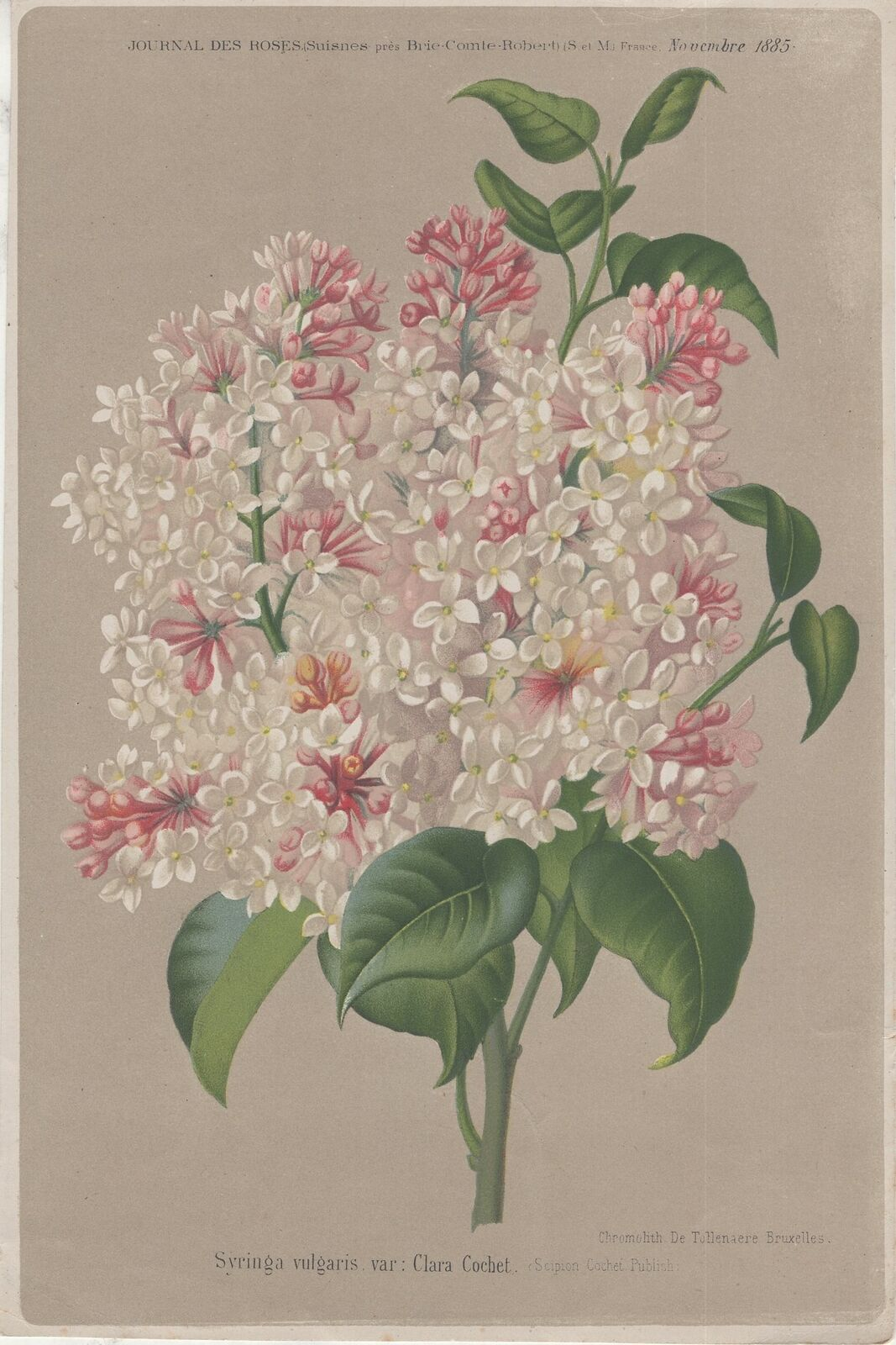 Illustration in Journal des roses (novembre 1885), Syringa vulgaris var. 'Clara Cochet'.